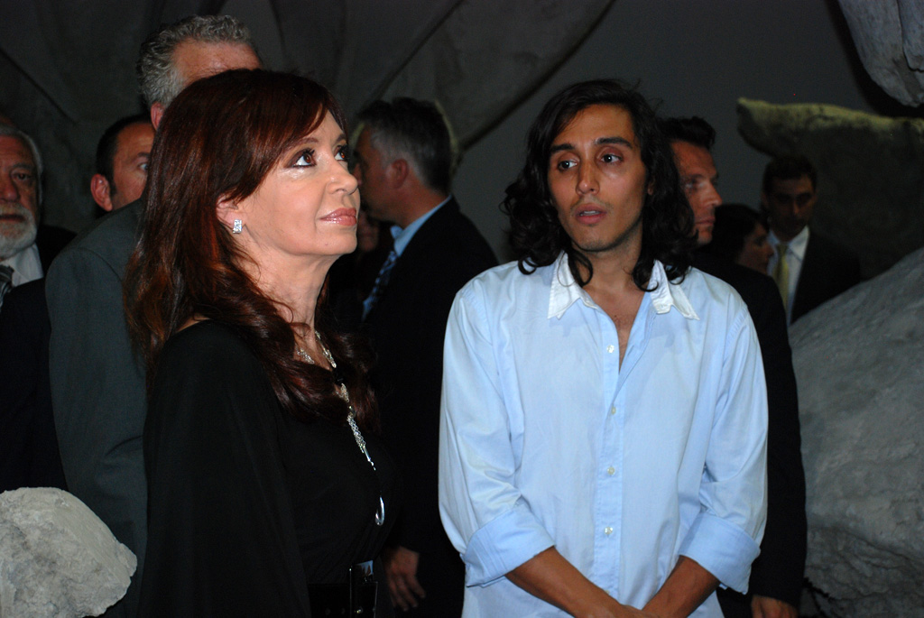 La Presidenta de la Nación Cristina Fernández de Kirchner con el artista argentino del envío nacional Adrián Villar Rojas.